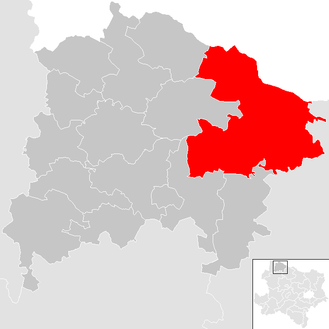 Bezirk Waidhofen an der Thaya